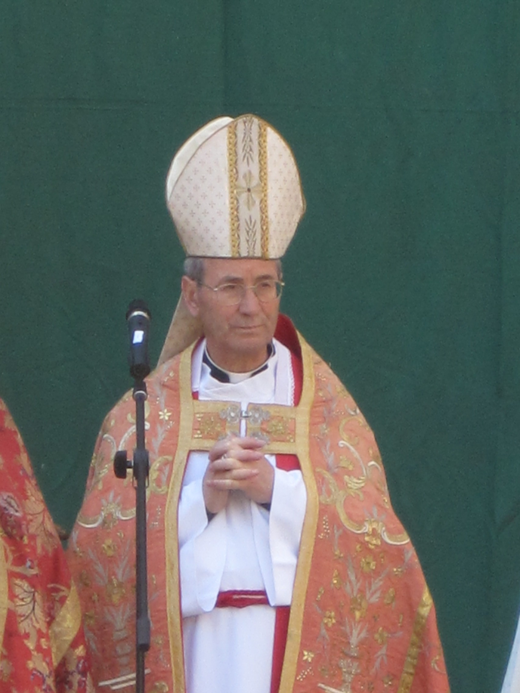 Camilo Lorenzo, obispo de Astorga (León, España), en abril de 2011.